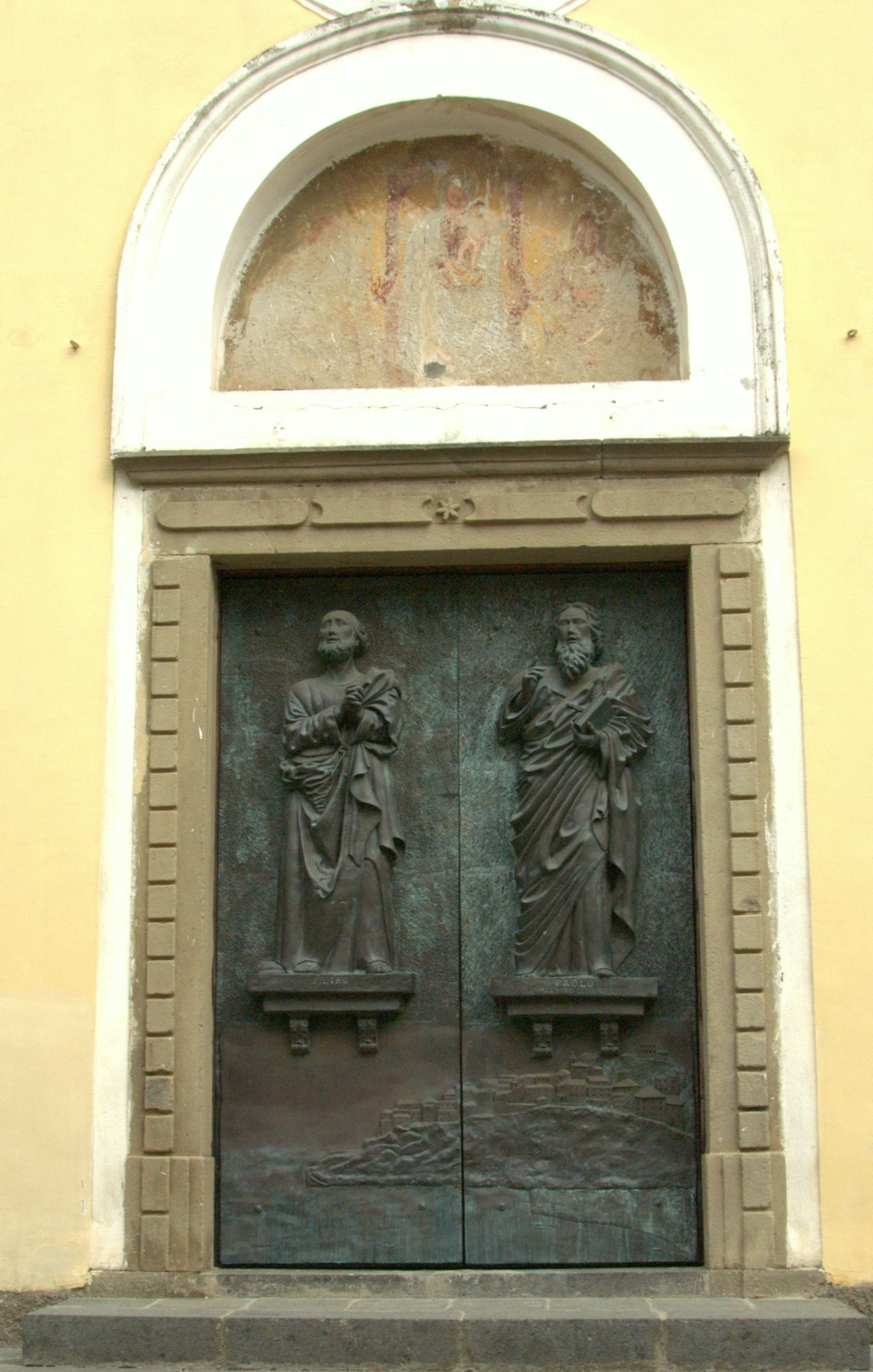 Ворота Петропавловской церкви